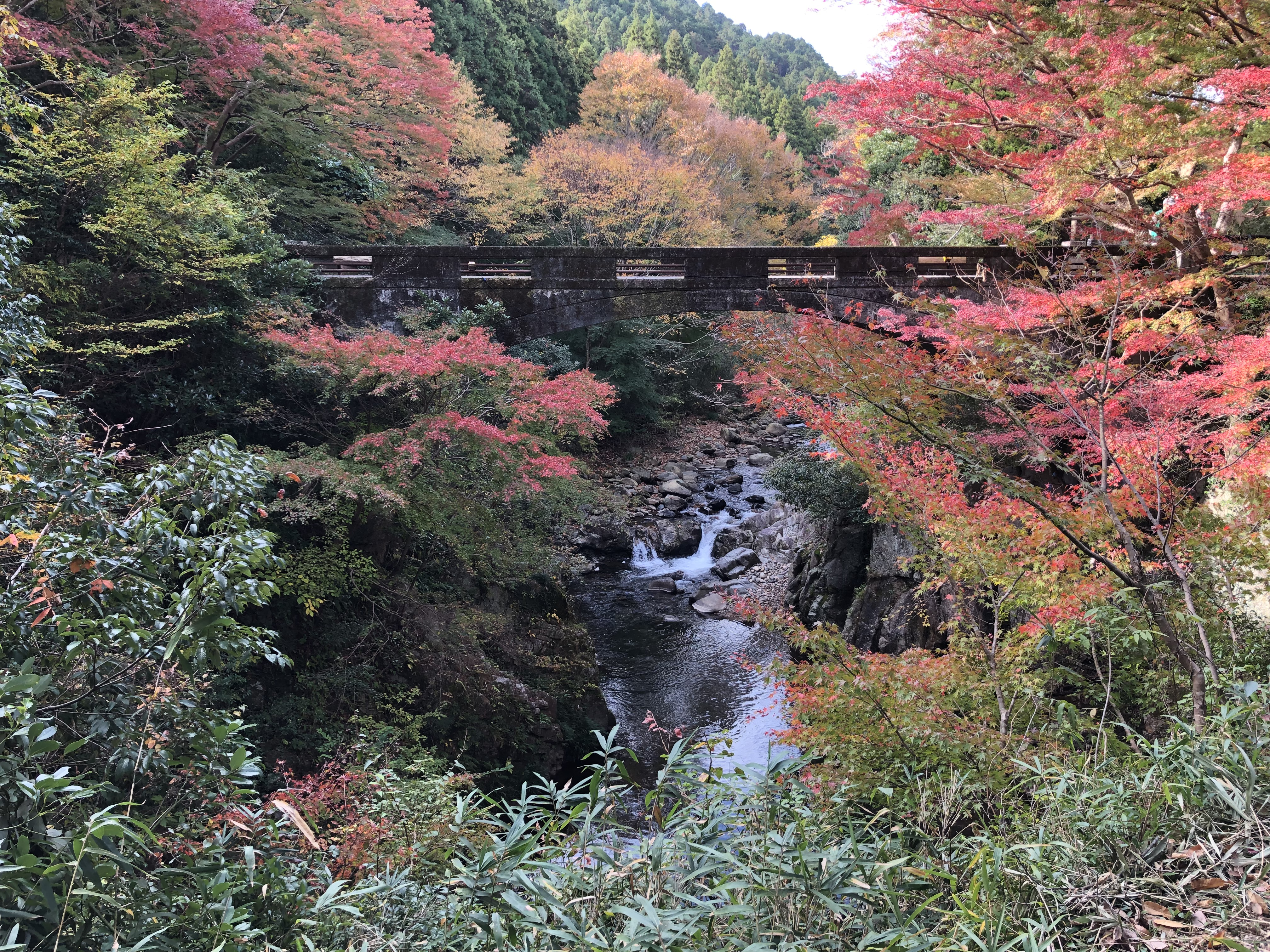 紅葉に染まった河内渓谷〔こうちけいこく〕。安濃川に架かる橋は忍田橋。上流（南西）の方向を見る。三重県津市芸濃町雲林院。